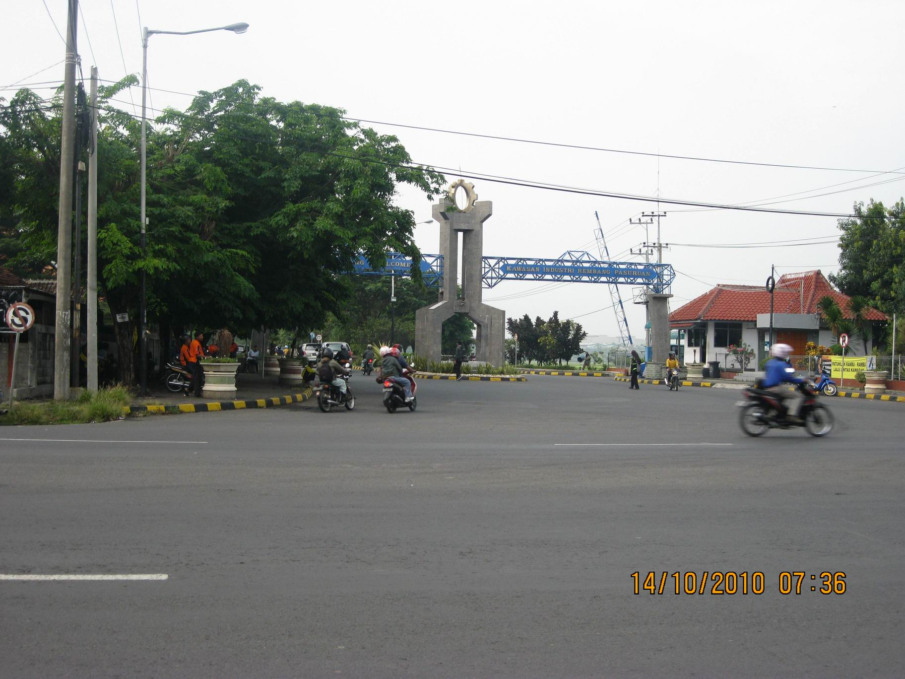 Gate of Pasuruan Industrial Estate Rembang (Gerbang Kawasan Industri PIER di Raci, Bangil - Pasuruan)